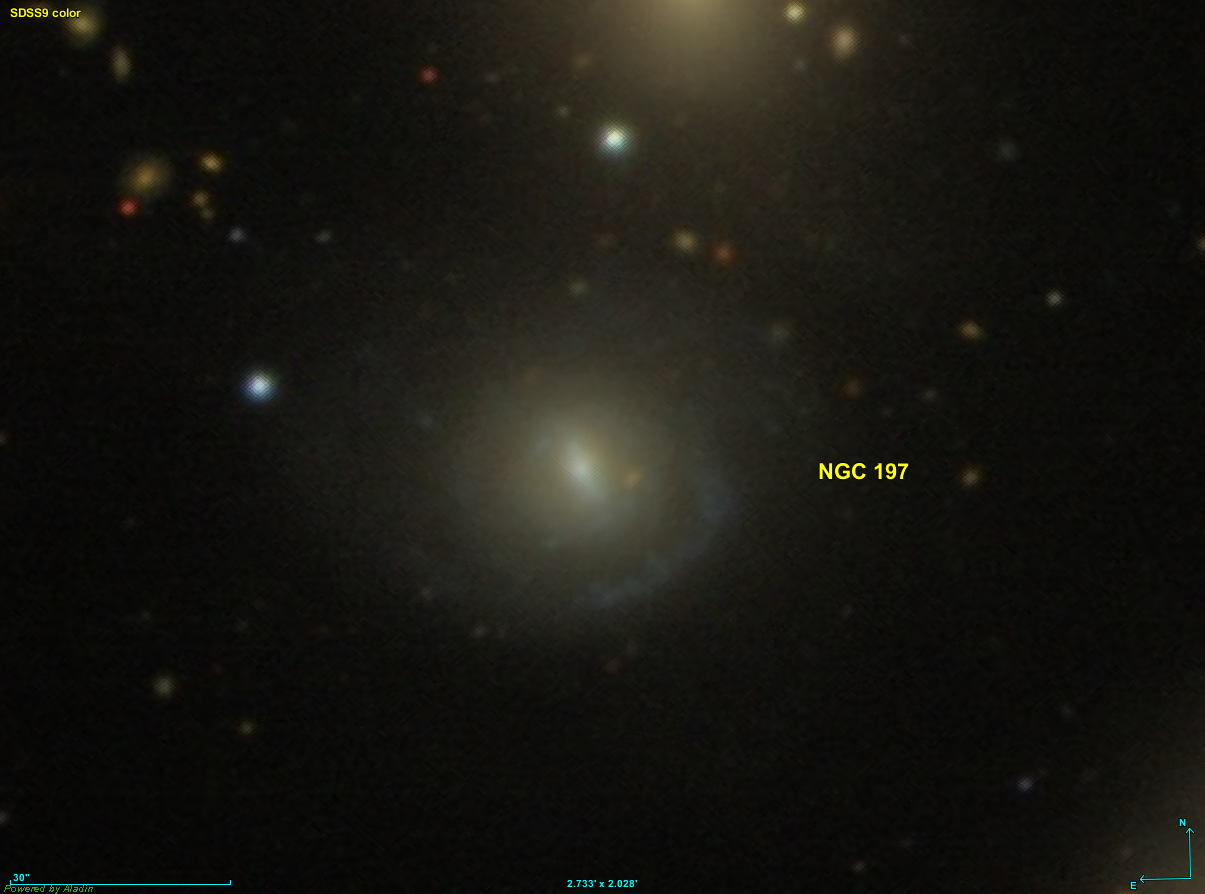 Image créée à l'aide du logiciel Aladin Sky Atlas du Centre de Données astronomiques de Strasbourg et des données de SDSS (Sloan Digital Sky Survey).